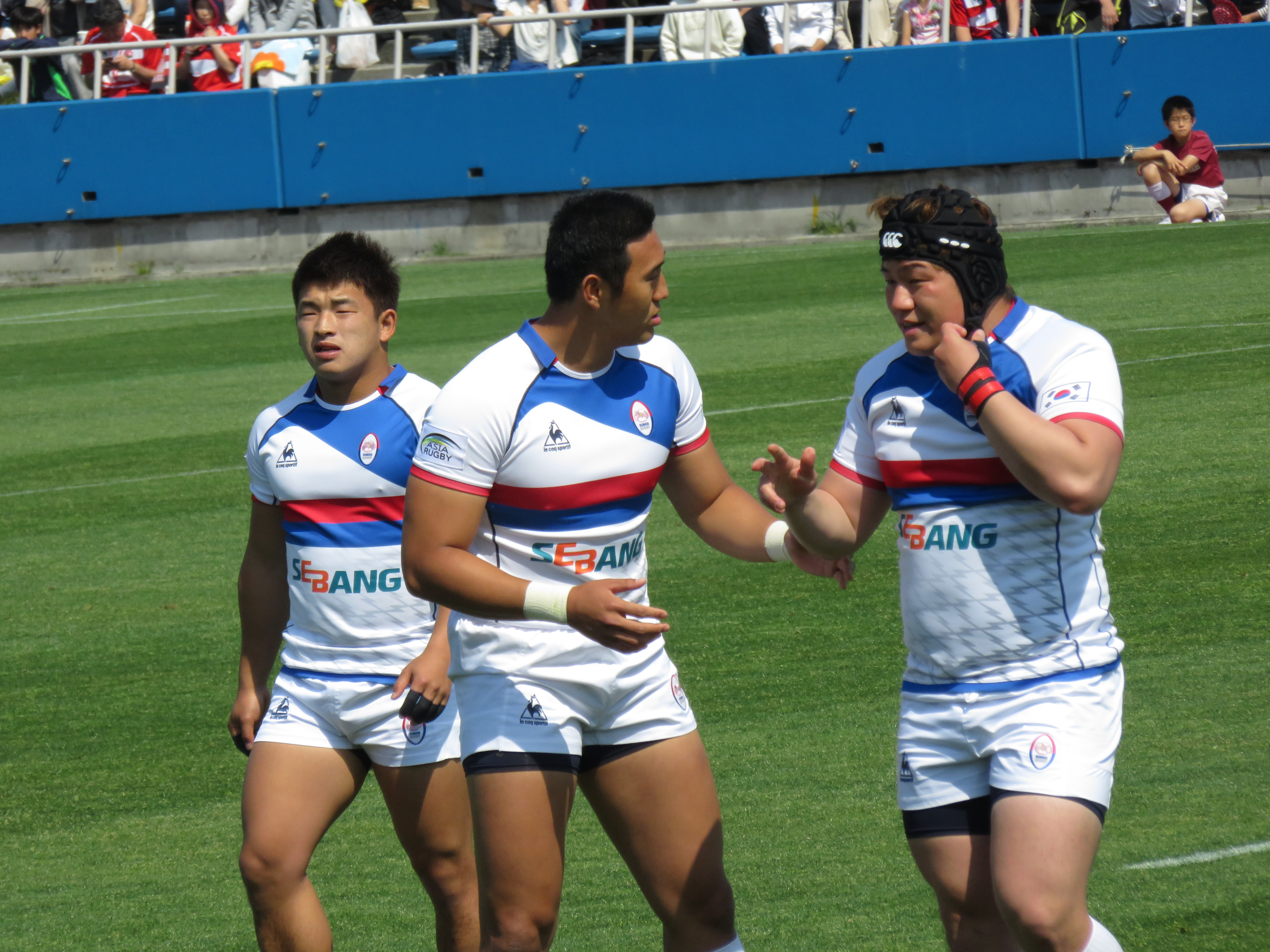 アジアラグビーチャンピオンシップ2016 日本対韓国。 韓国の選手たち。